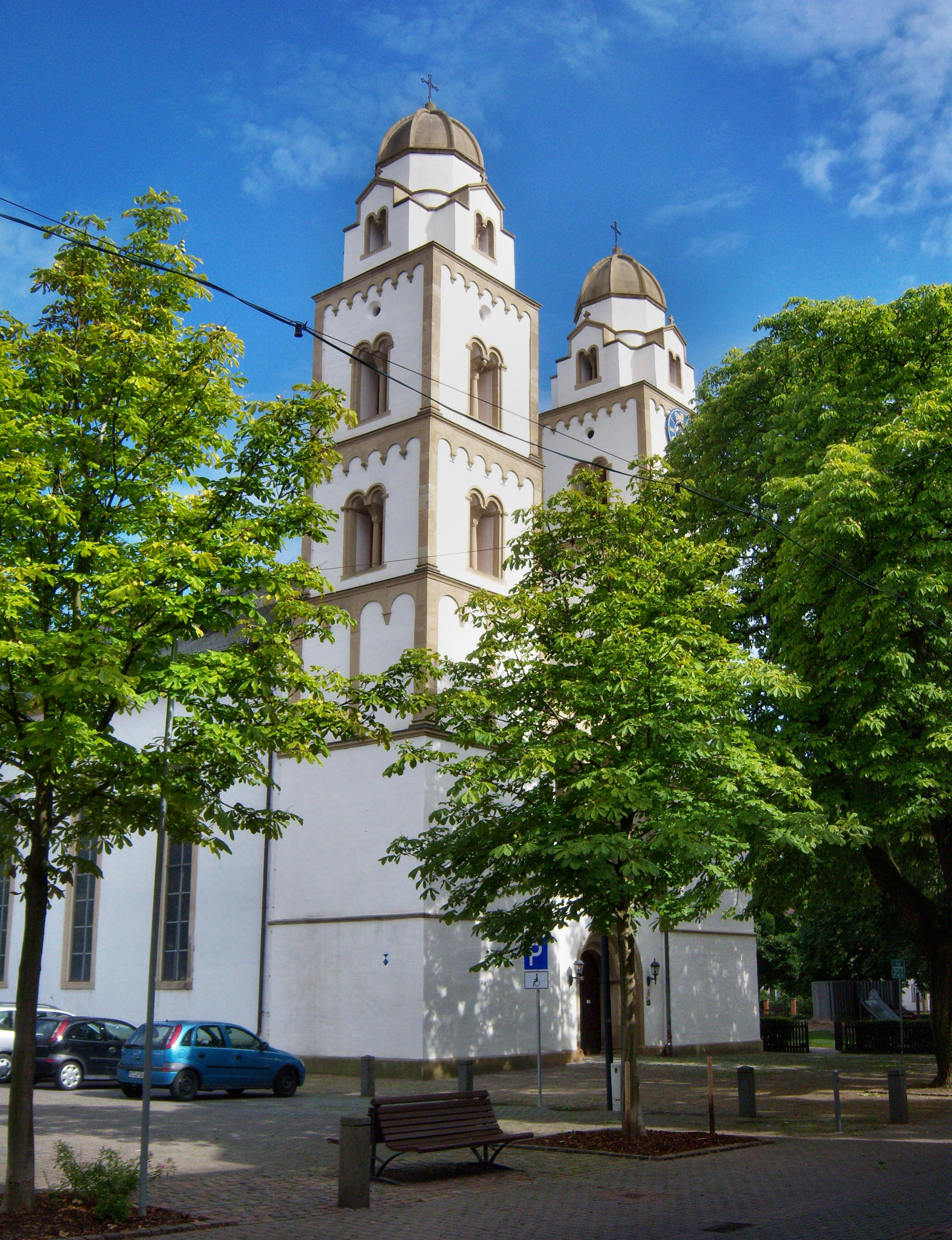 Die Guntersblumer evangelische Kirche in Rheinhessen in Rheinland-Pfalz (Deutschland) von der Straße Marktplatz (Nordseite) aus